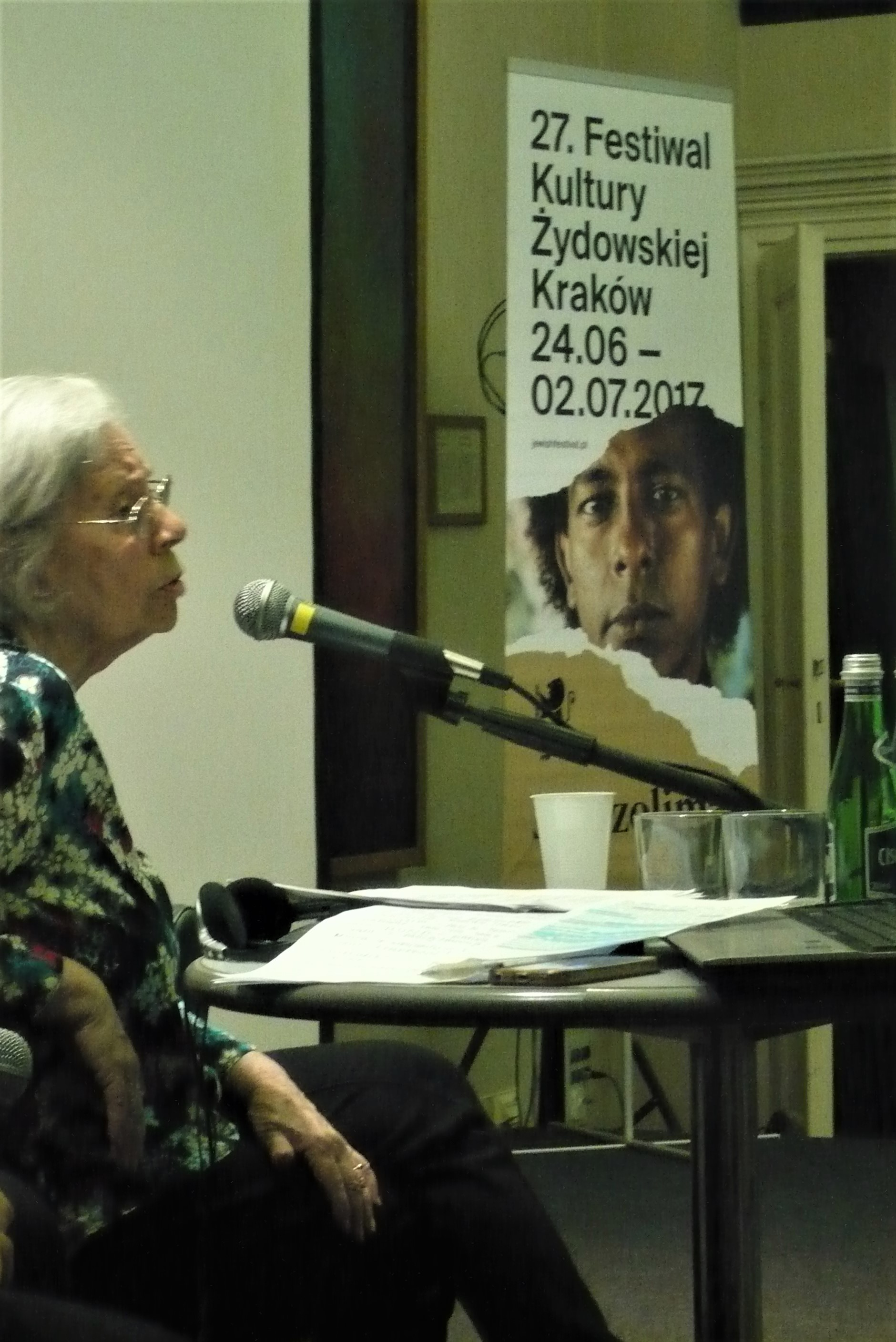 Irena Klepfisz